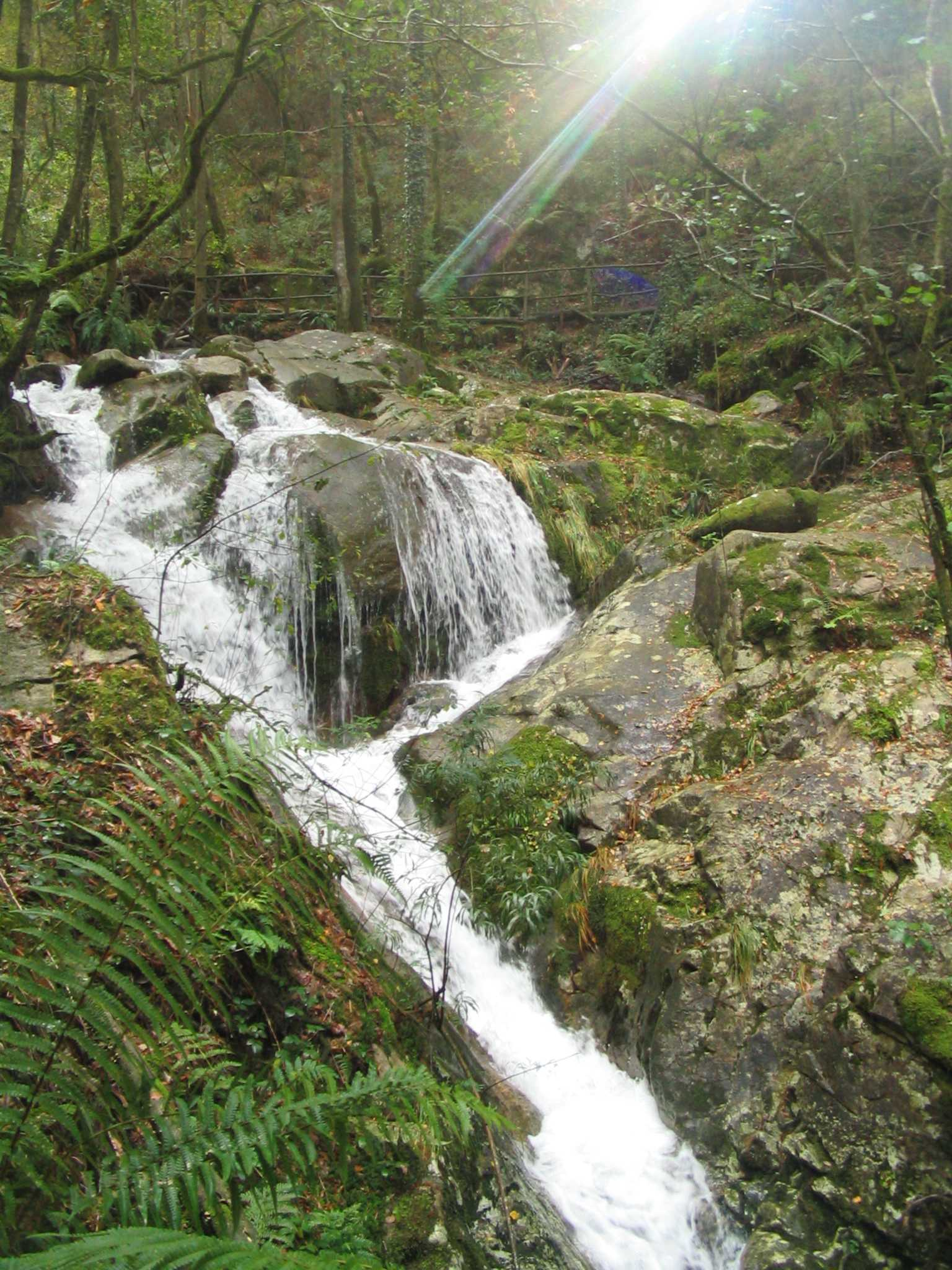 foto de la fervenza(cascada) del Rio dos Ladrons o da Fraga en Moaña.